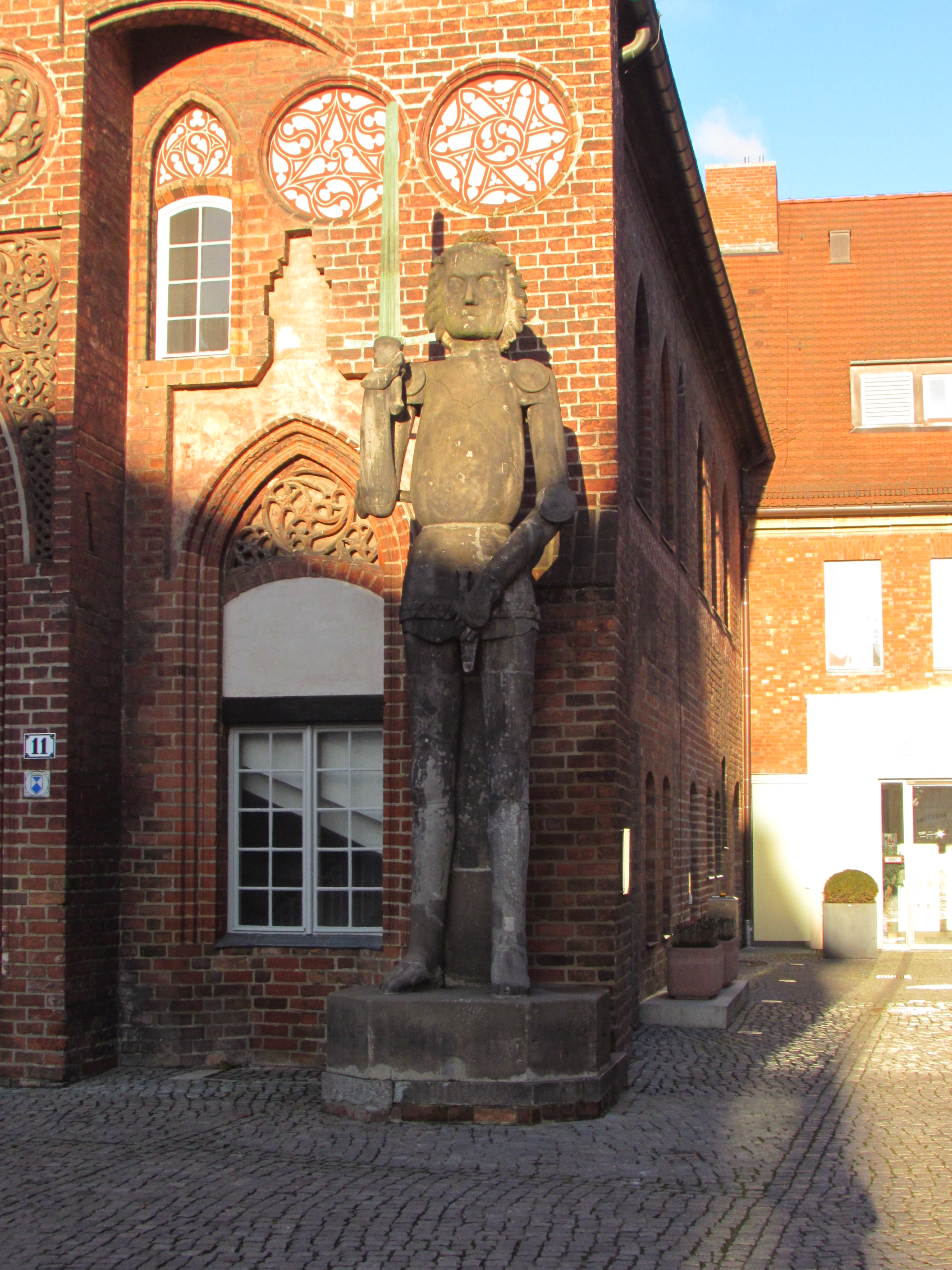 brandenburger roland